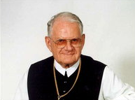 Erzabt Polykarp Zakar OCist, Abt von Zirc, Generalabt des Zisterzienserordens 1985-1995